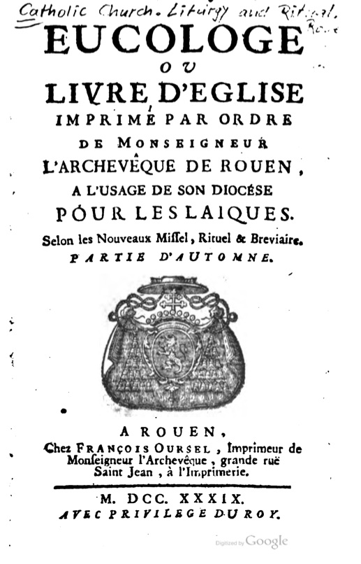 Page titre d'un eucologe du 18e siècle